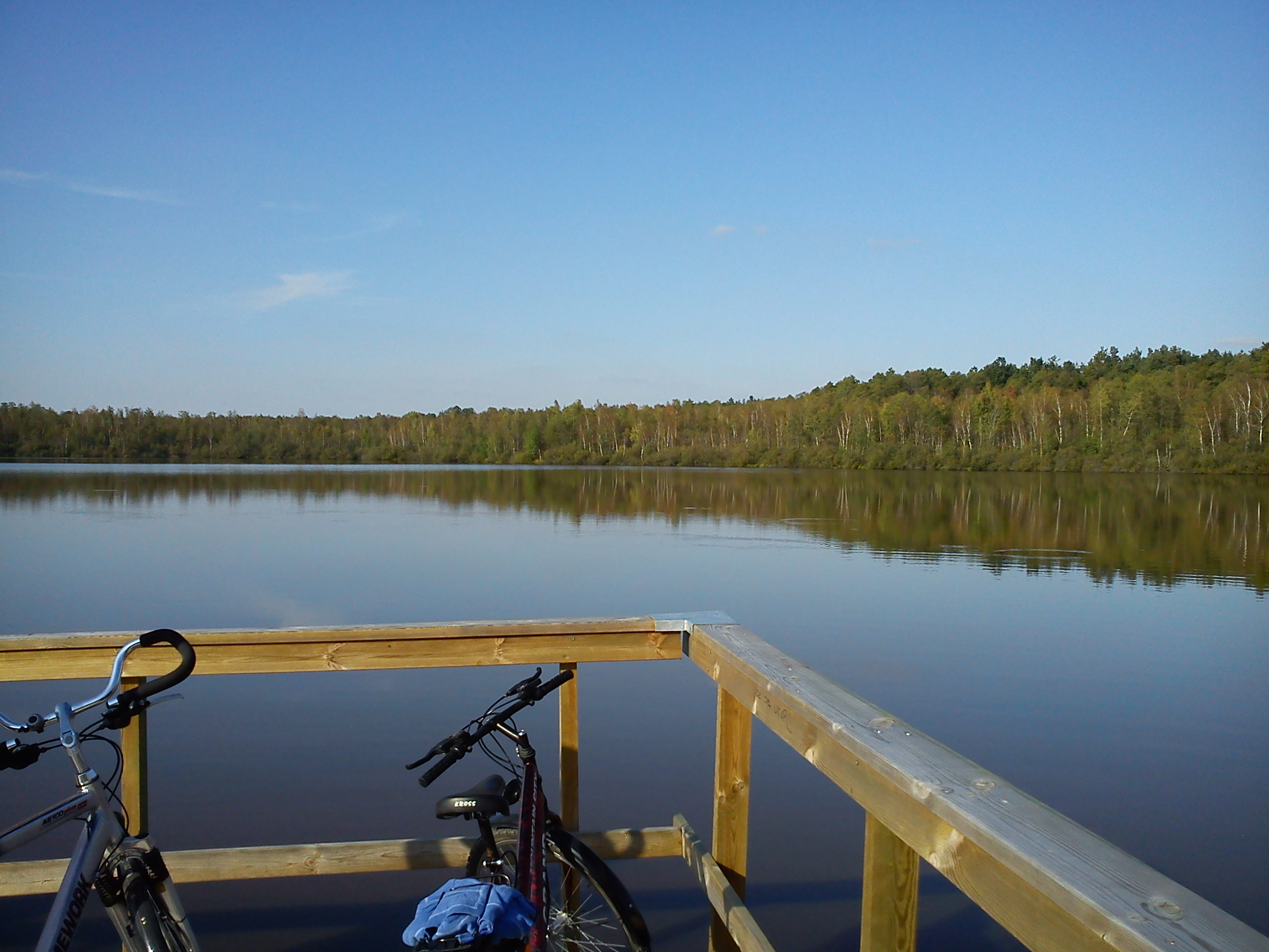 Obradowskie